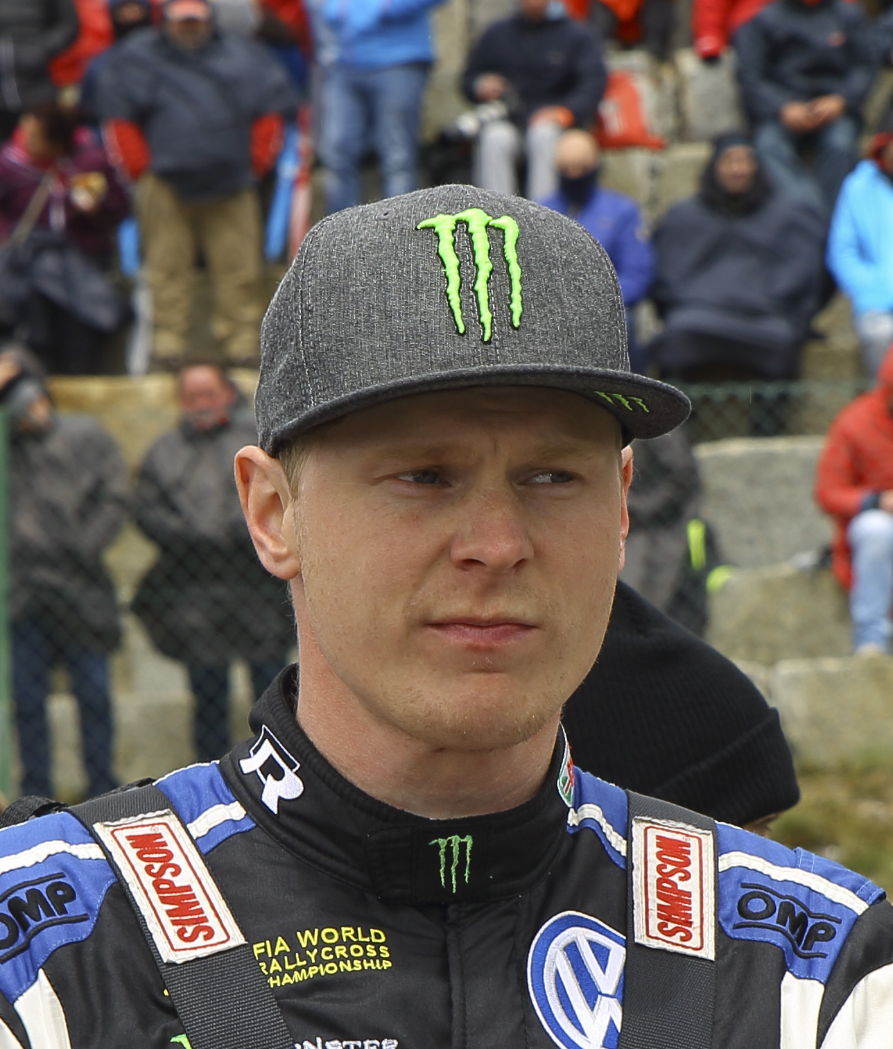 Johan Kristofferssonganó en la final en Portugal, tras hacerlo en España, el Sueco se afianza en el liderato provisional del Campeonato. Sin embargo no fue el mejor en las mangas de entrenamiento que fueron dominadas por Andreas Bakkerud.